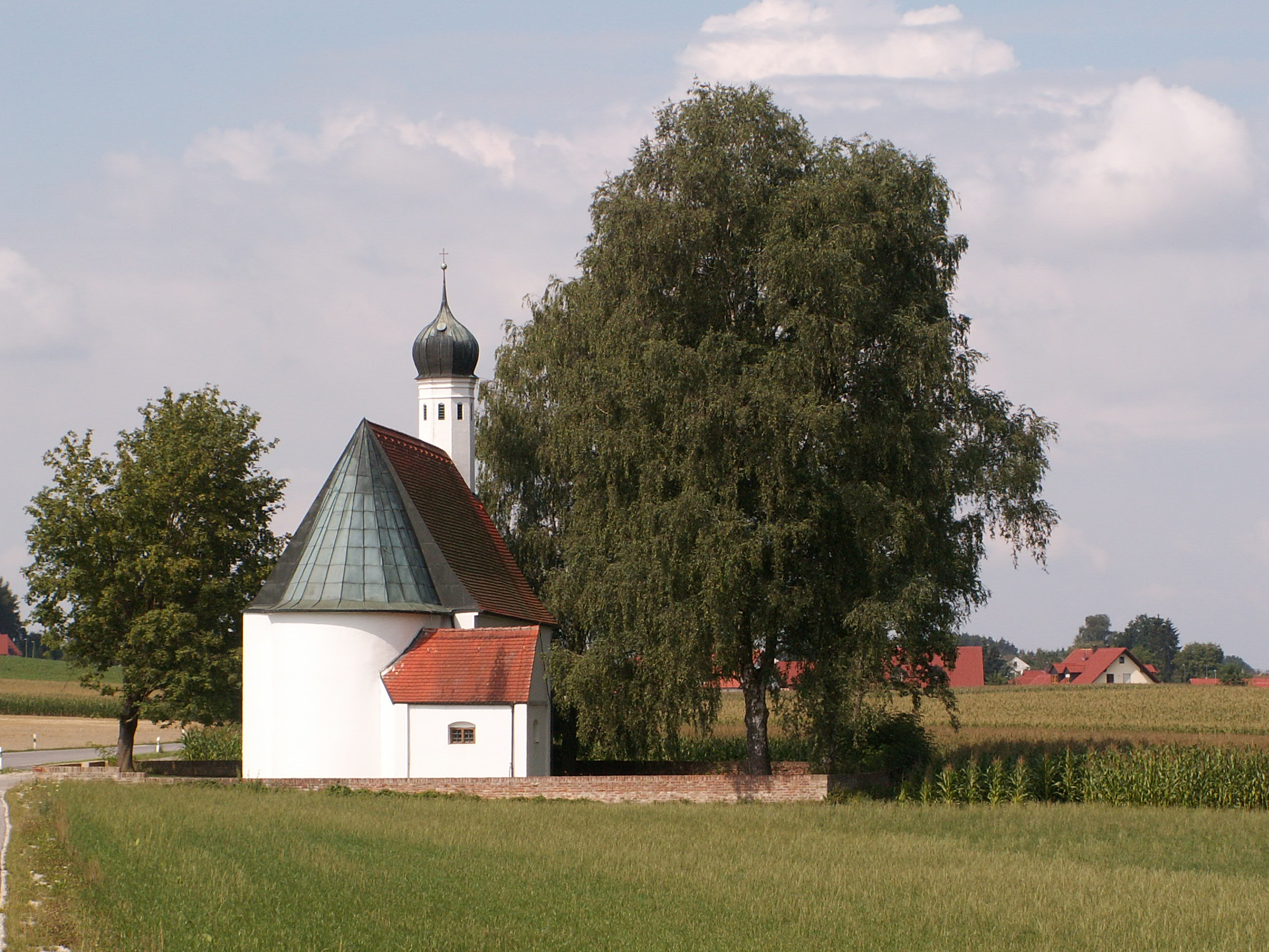 Kapelle Mariazell bei Ried (bei Mering)